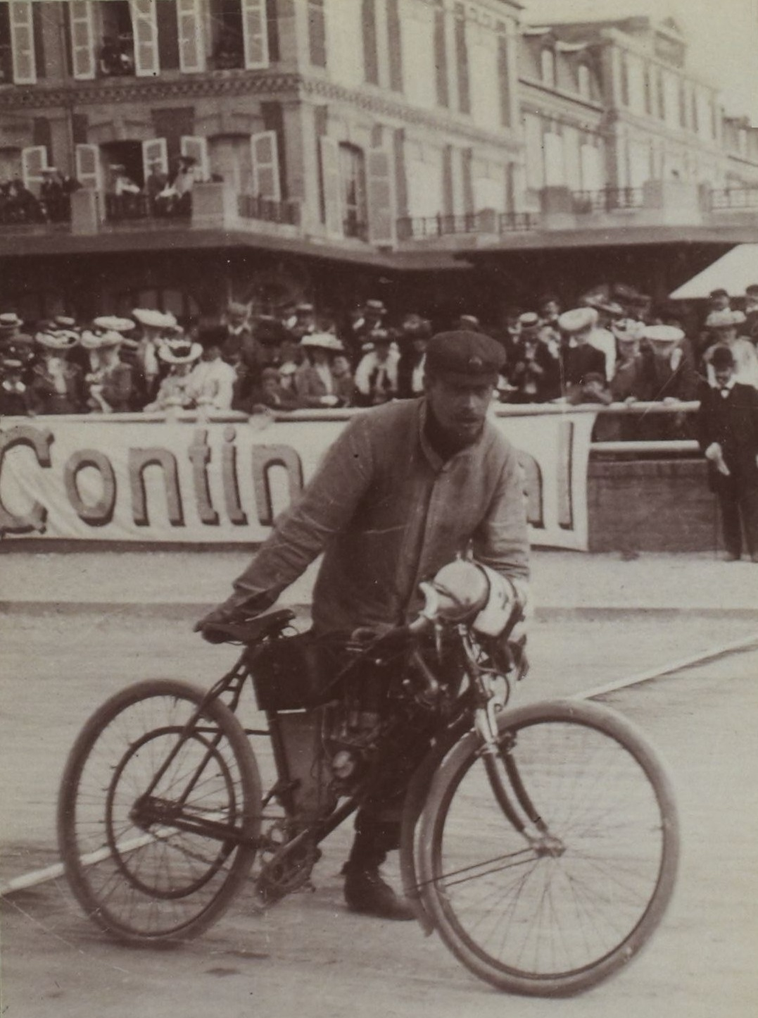 [Collection Jules Beau. Photographie sportive] : T. 23. AnnÃ©e 1903 / Jules Beau : F. 13v. [500 mÃ¨tres, Deauville, 10 septembre 1903]